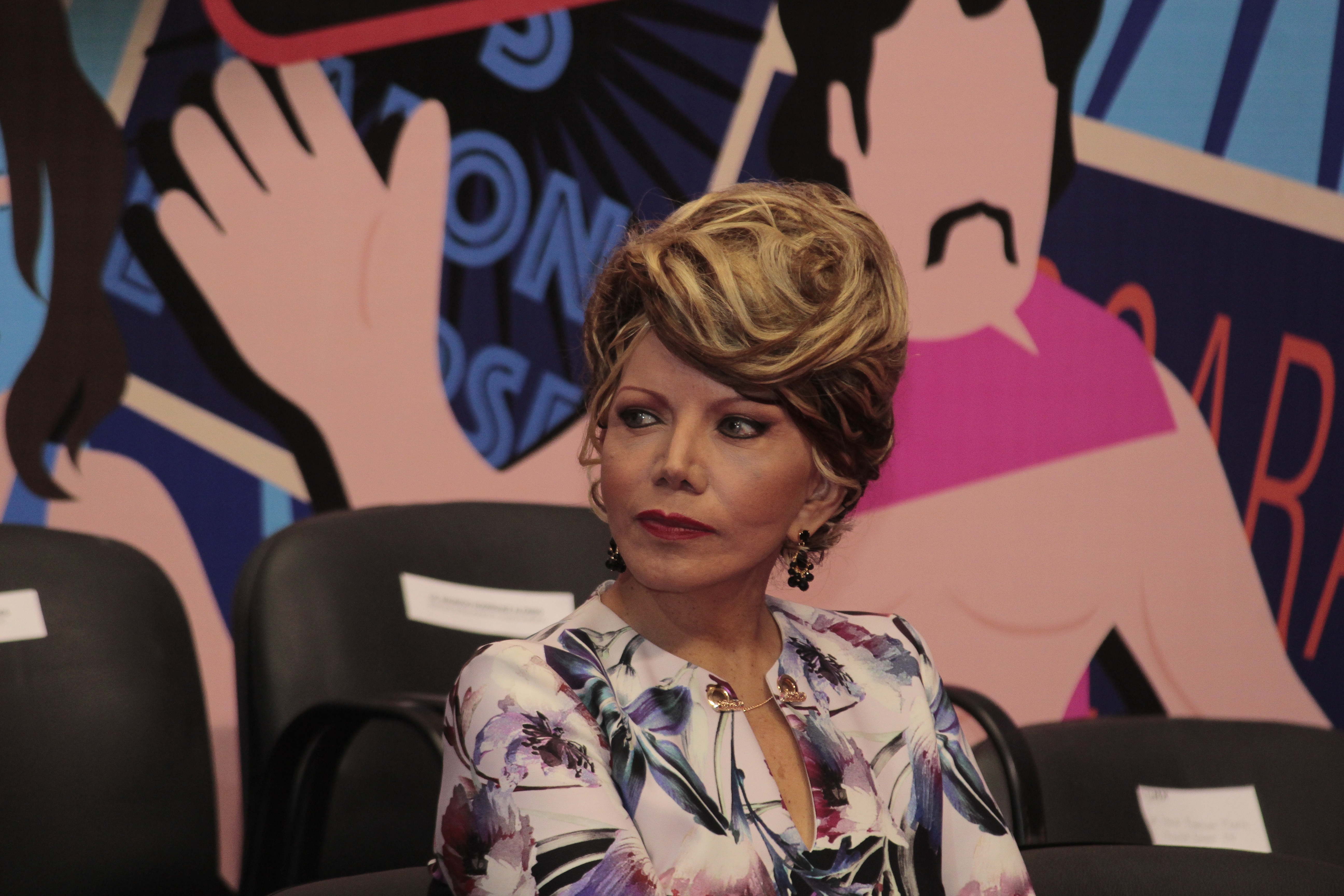 Marisela Peña qui est la présidente de la Lucha Libre AAA Worldwide en 2018.